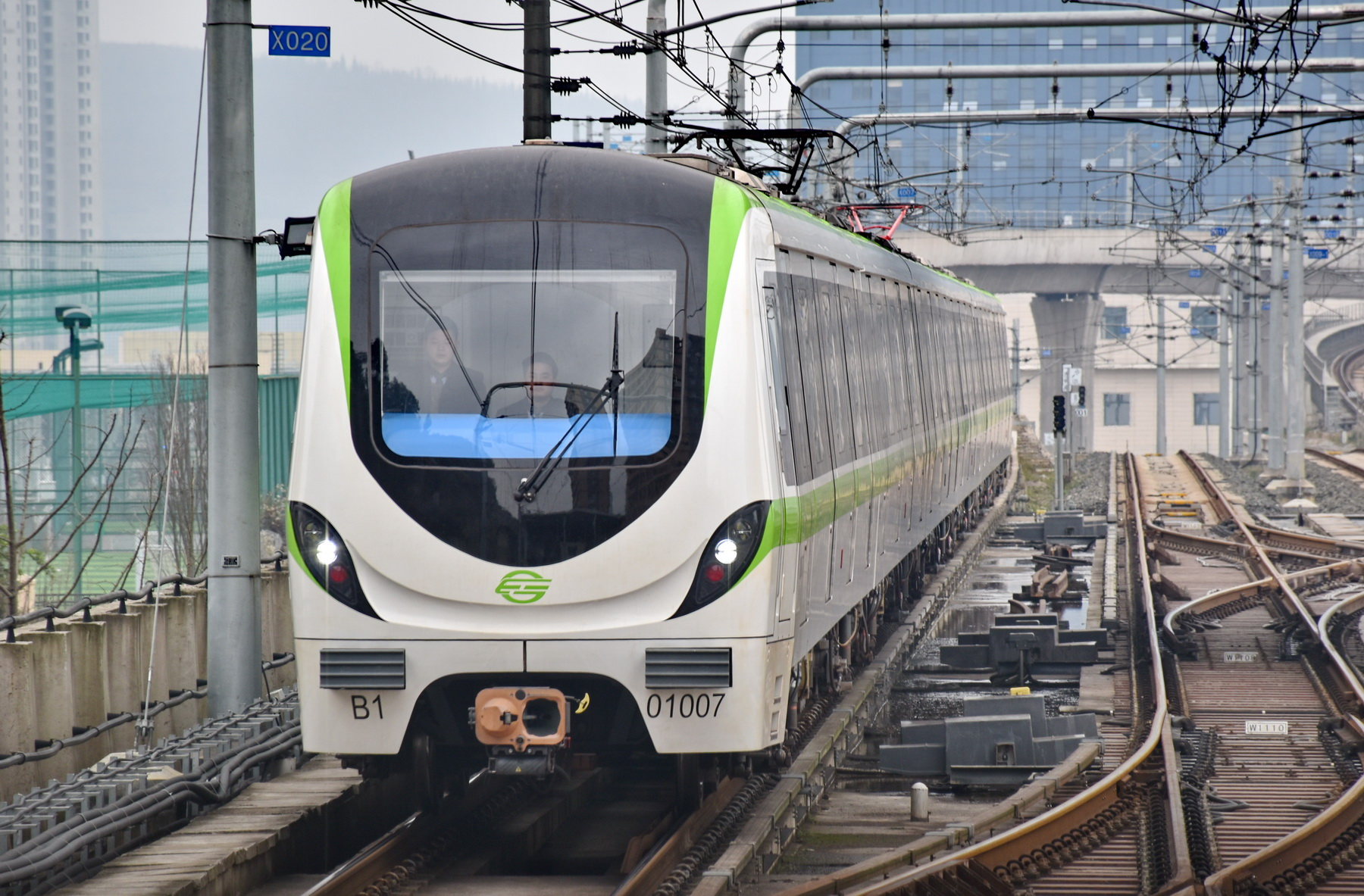 贵阳轨道交通1号线 中车南京浦镇B型车